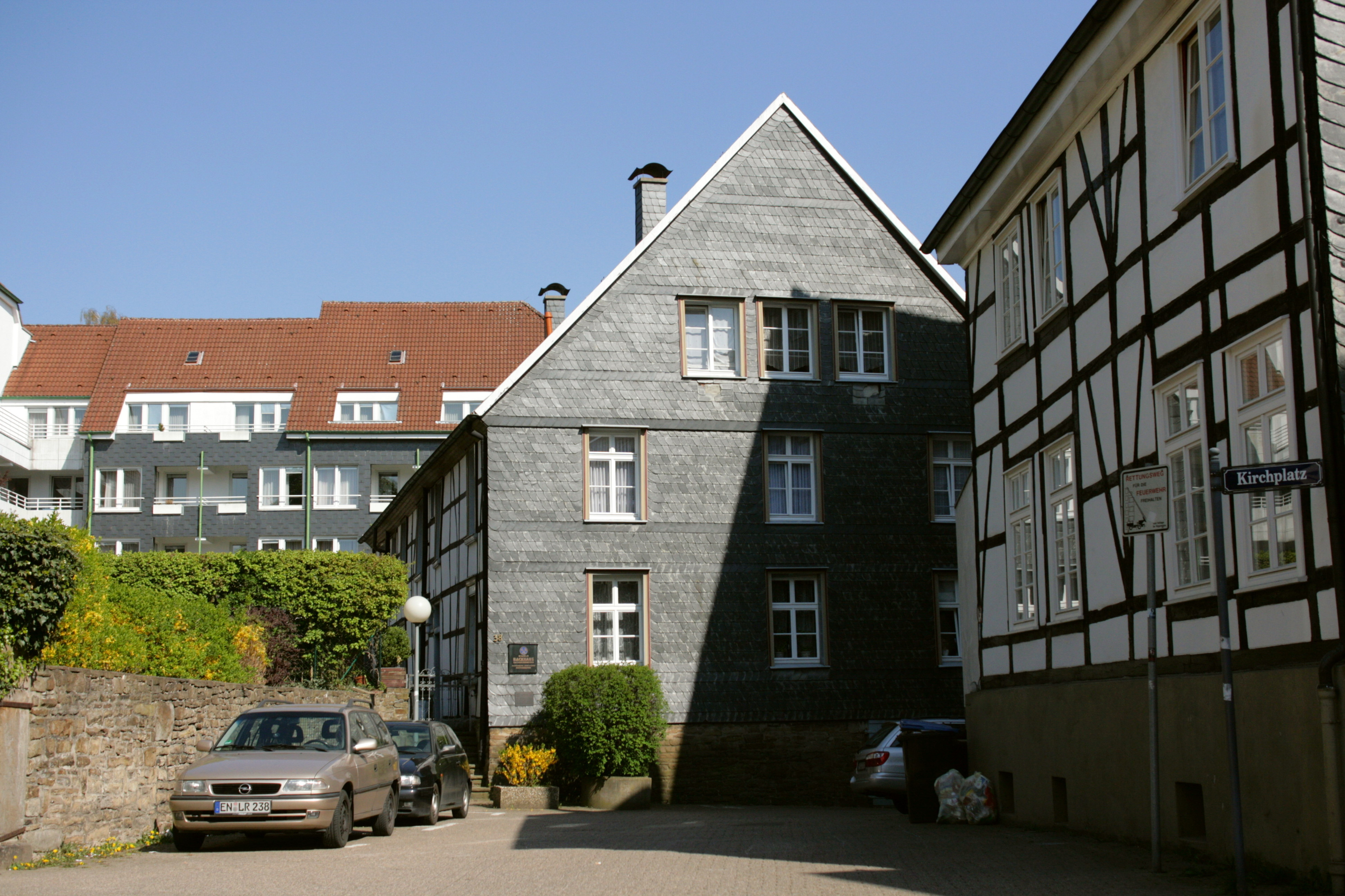 Armenhaus, Emschestraße 38 in Hattingen